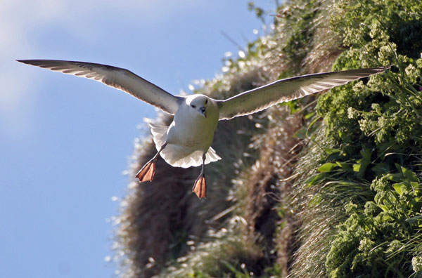 Eissturmvogel (Fulmarus glacialis) auf der norwegischen Vogelinsel Runde